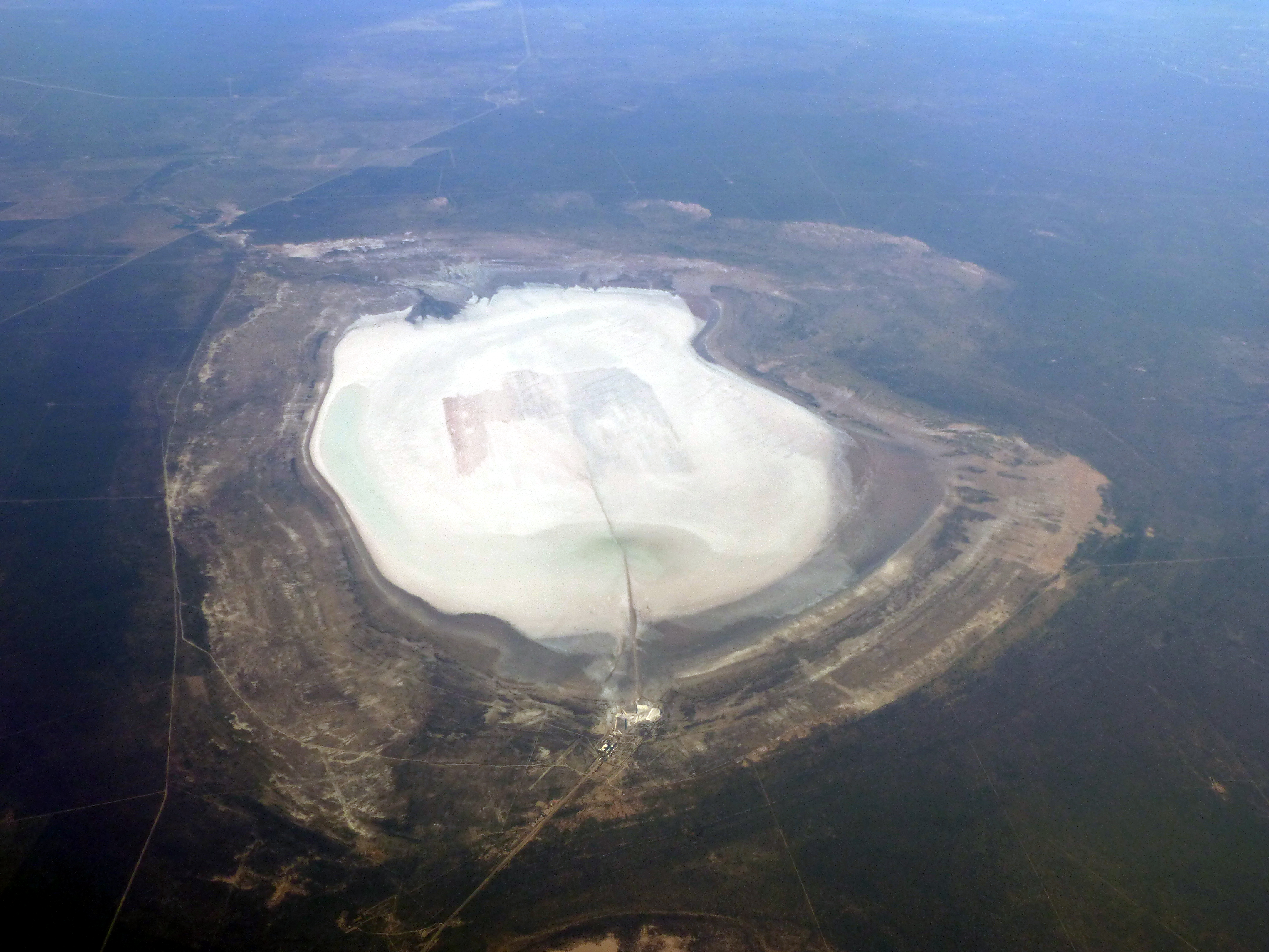 Vista aérea de Salinas del Bebedero (San Luis) tomada desde la ventana de un avión.